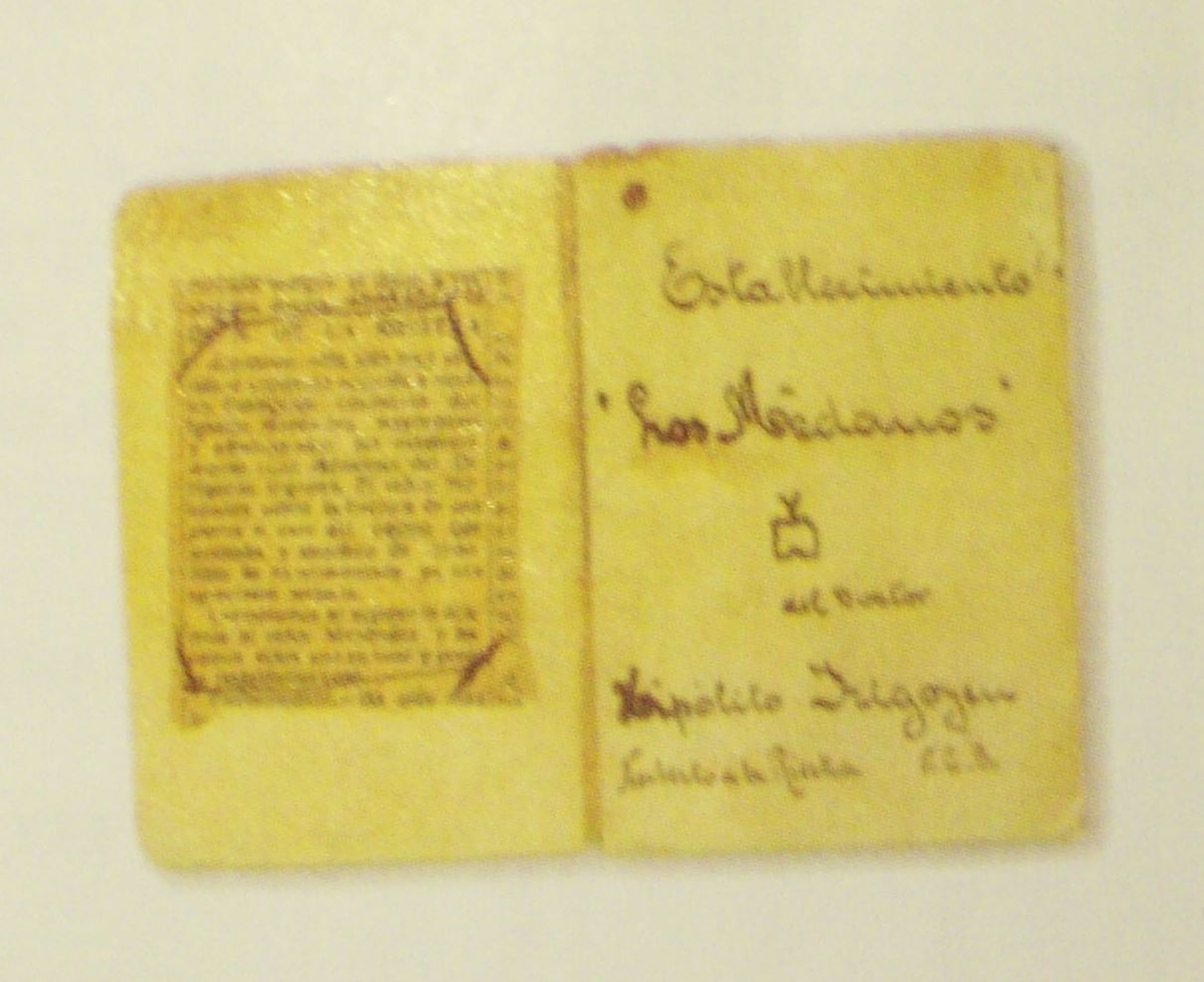 Escrituras de los campos Los Médanos, perteneciente a H. Yrigoyen.